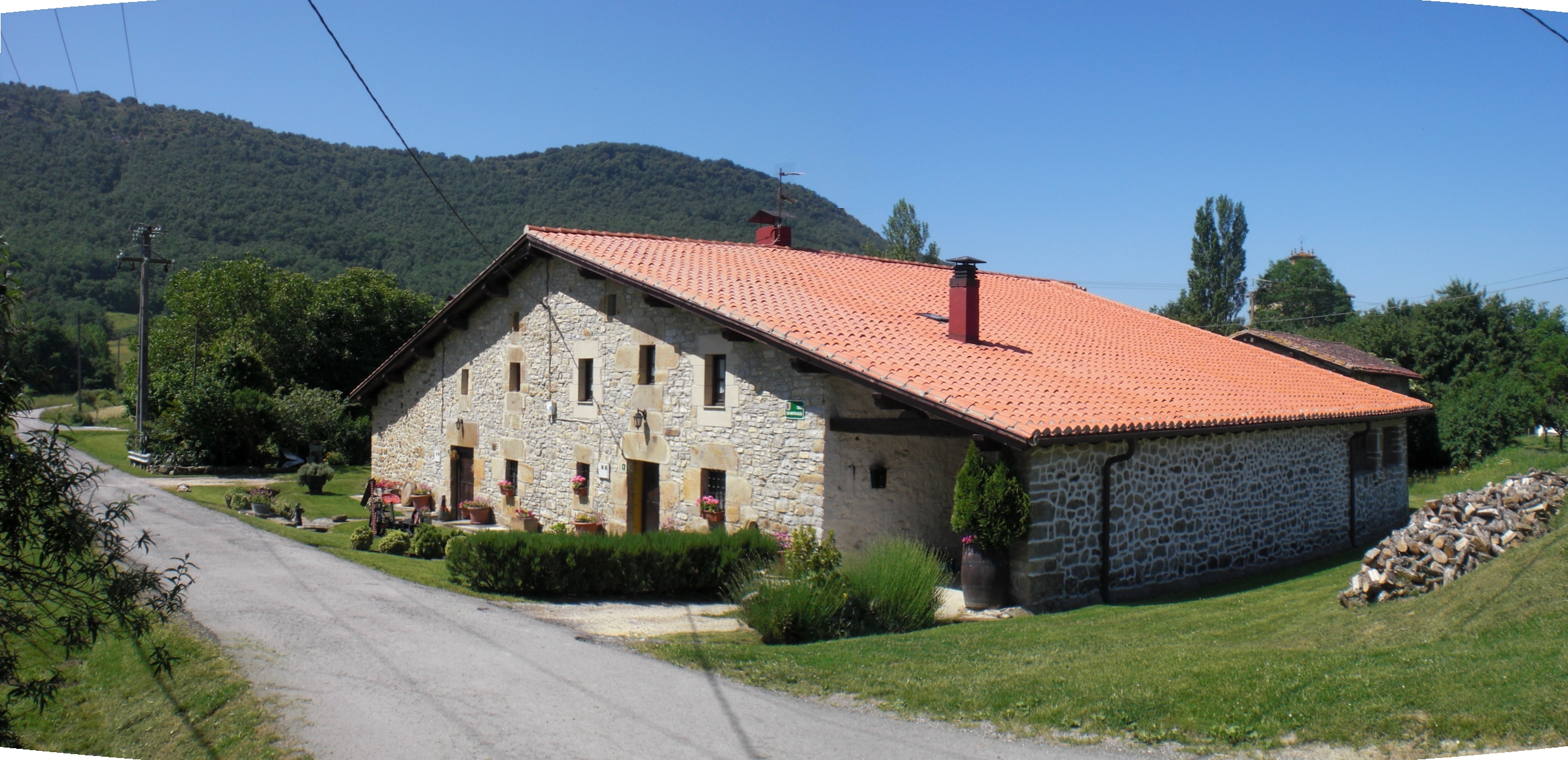 Barrundiako Hermuako baserria.